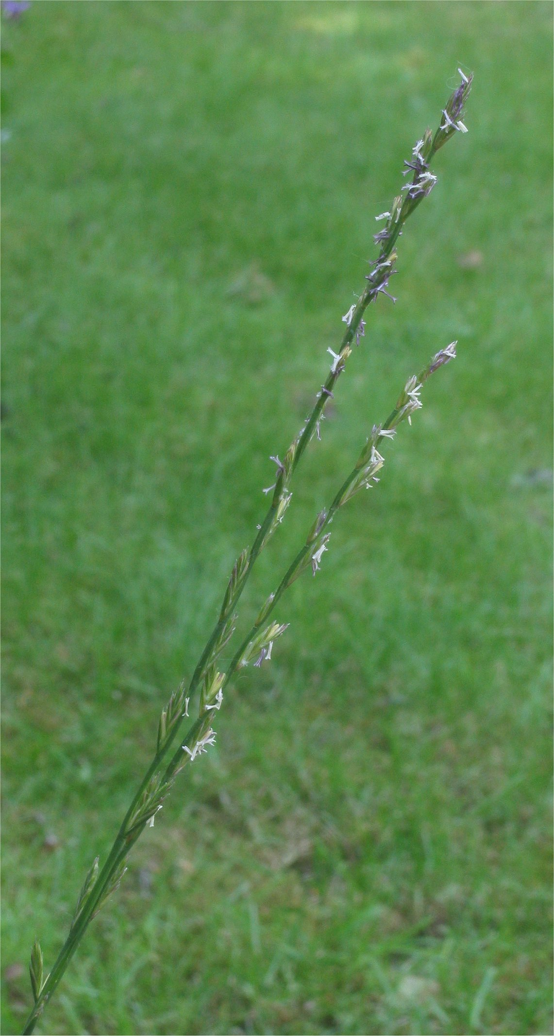 (Engels raaigrasaar in bloei) Lolium perenne flowering ear